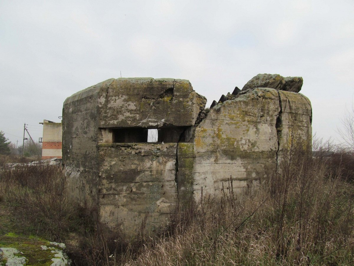 Сініцкае Поле. ДАП